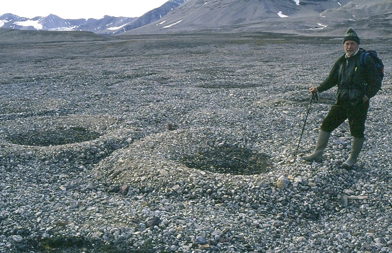 Cercles de pierre